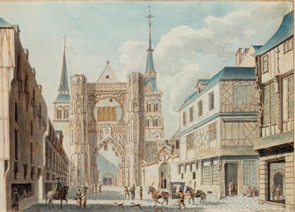 Eglise de Saint-Corneille à Compiègne abbaye Saint-Corneille Picardie french kings Famille Mottet